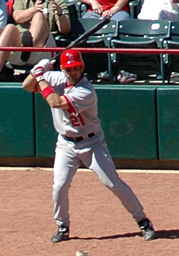 Lou Merloni